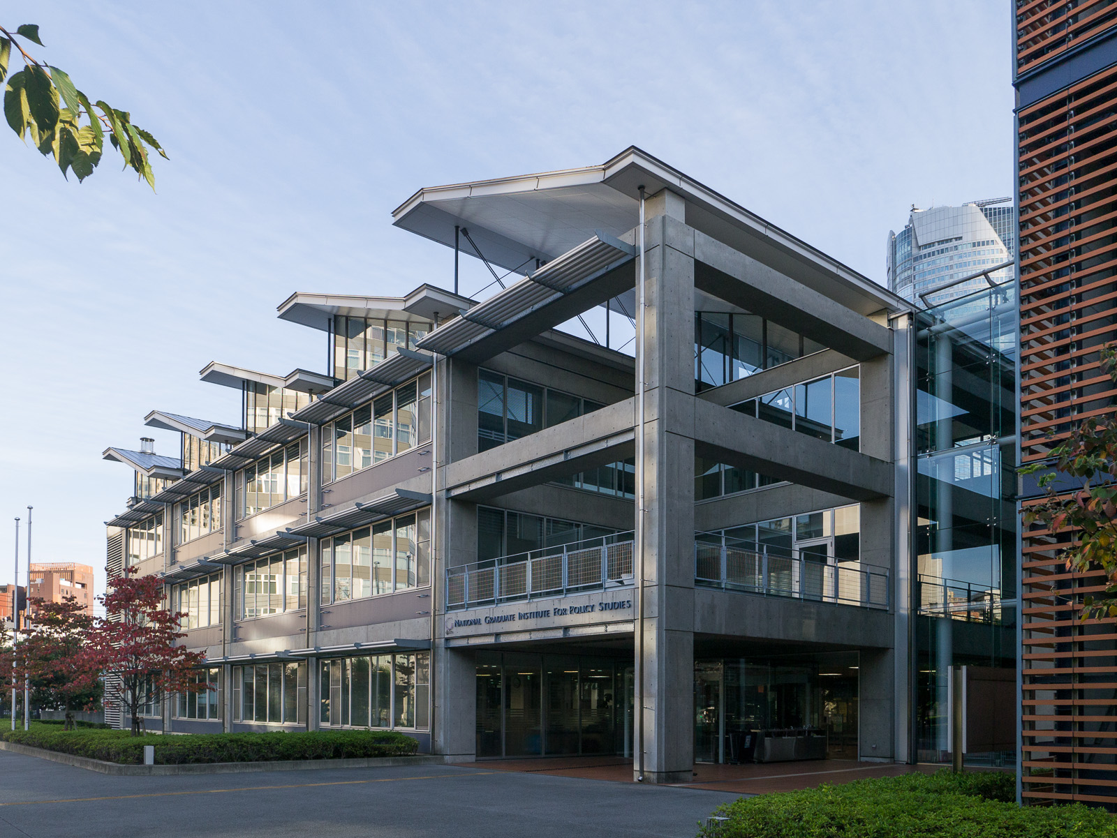 政策研究大学院大学、東京都港区六本木7-22-1。